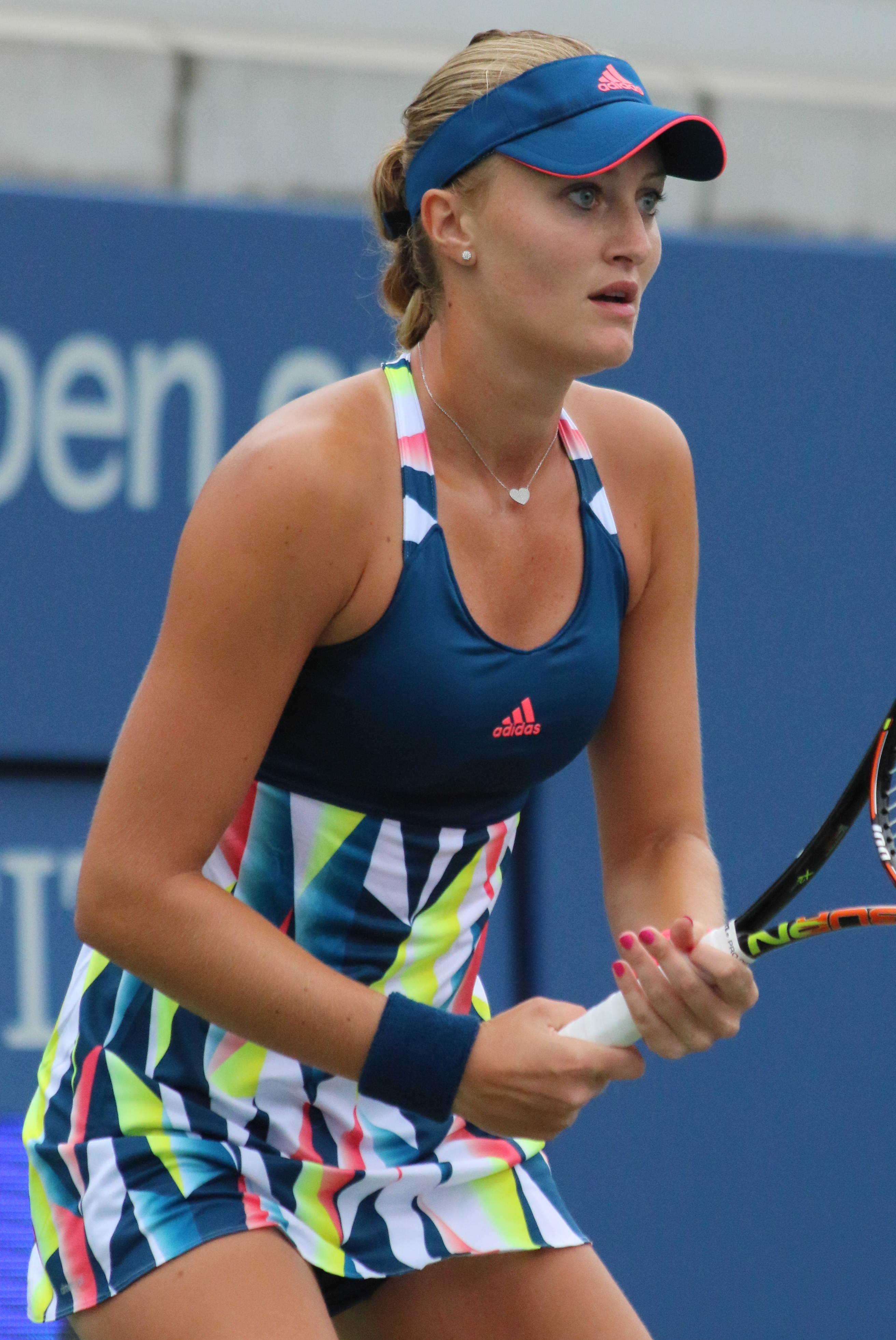 Mladenovic US16 (23)